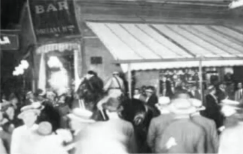 Represión a asambleistas radicales el 13 de diciembre de 1932